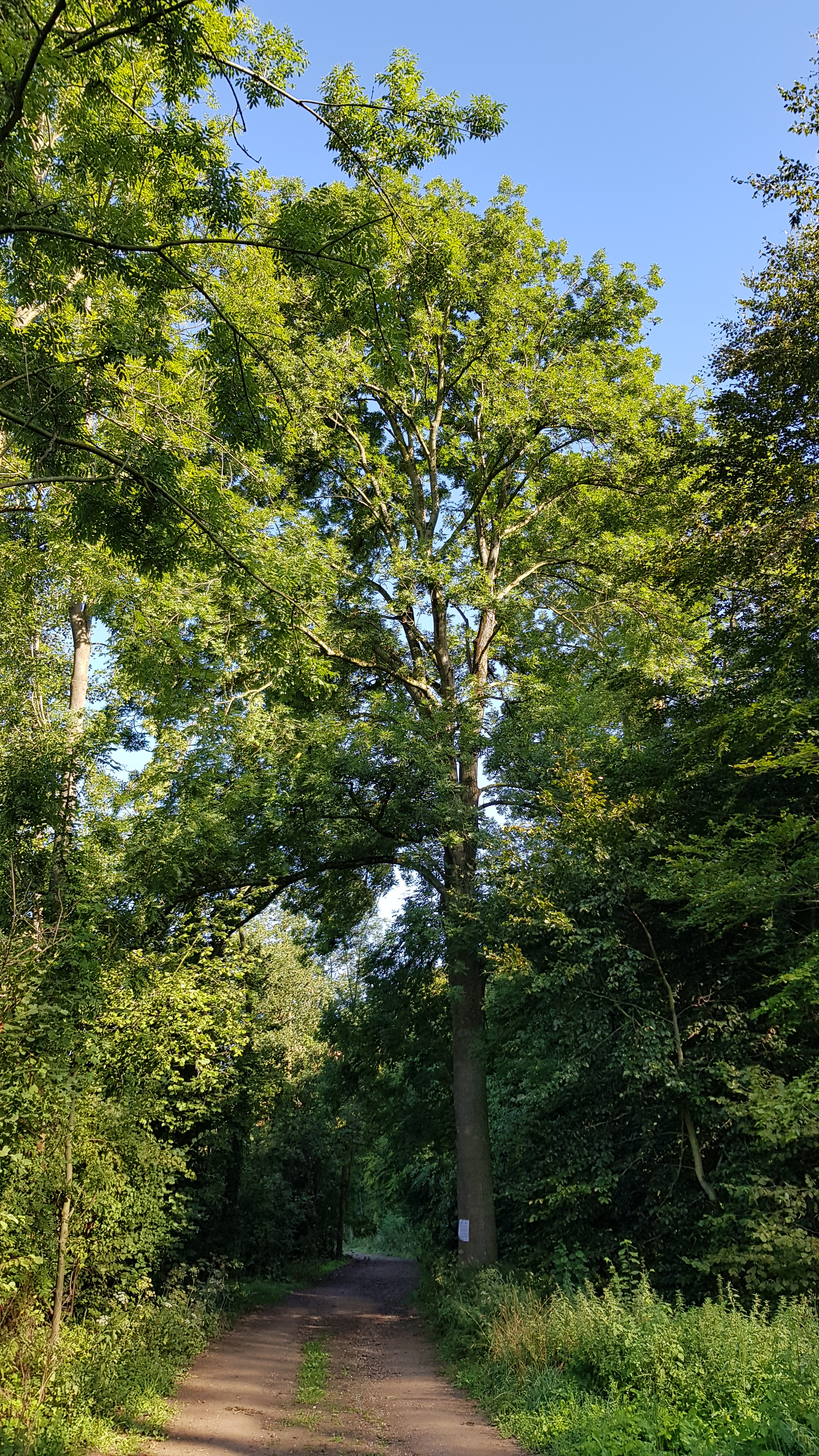 Grubweg bij Keunestraat, Cadier en Keer, Nederland